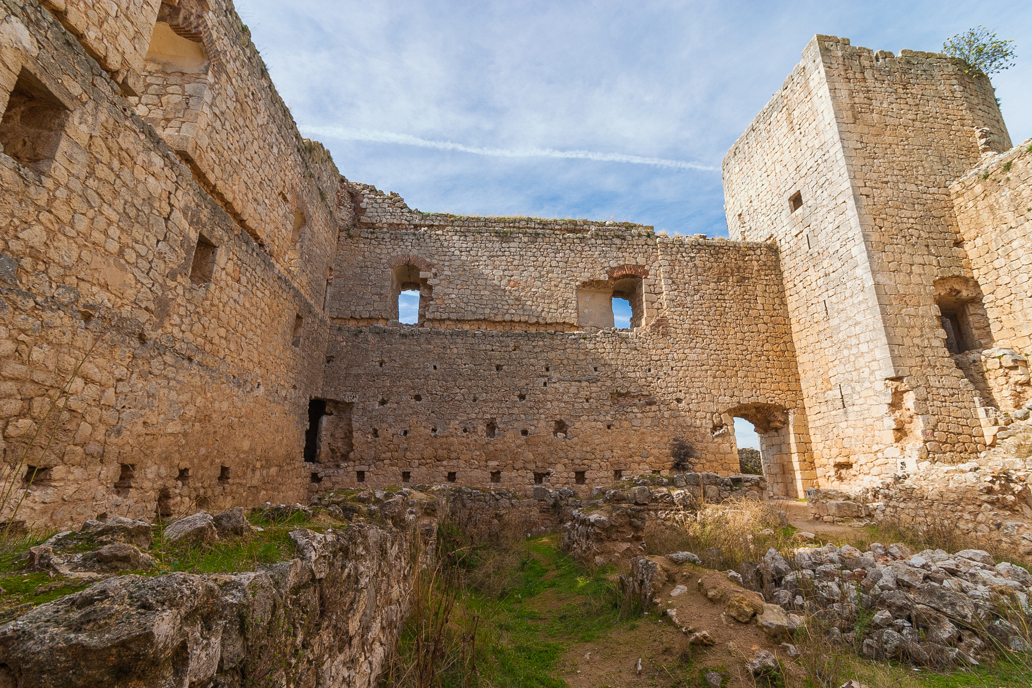 500px provided description: Castillo De Pioz [#300d ,#10-18 ,#Castillo de Pioz]